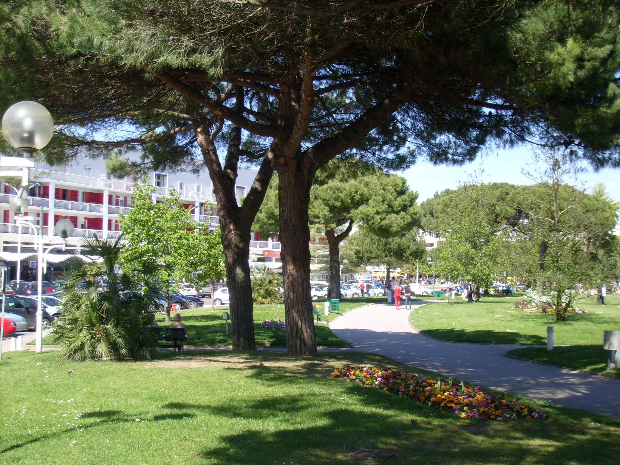 Promenade du front de mer, Royan, Charente-Maritime, France